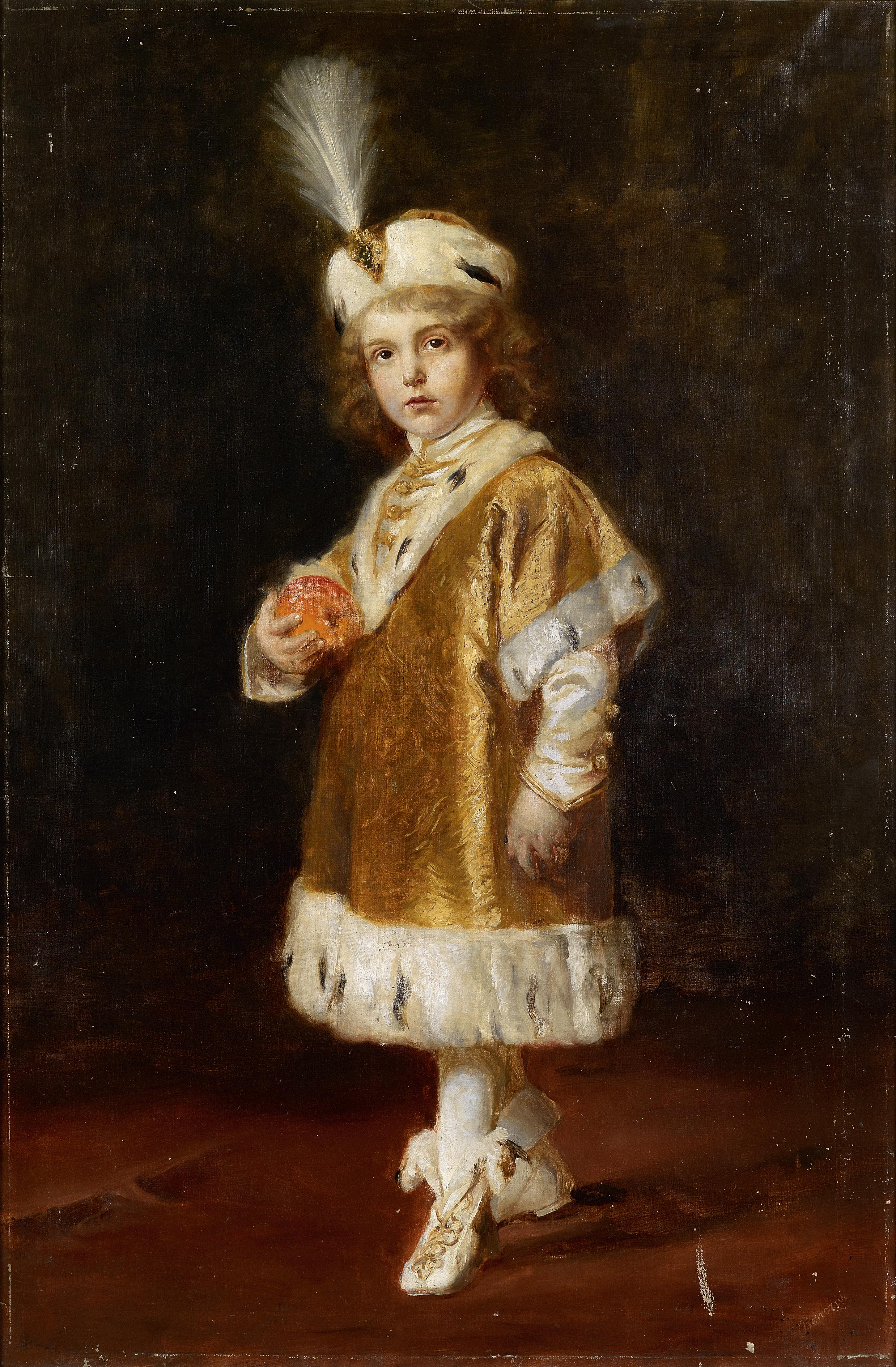 Kronprinz Otto (1912-2011), Porträt als vierjähriger Thronfolger im ungarischen Krönungsgewand, Öl auf Leinwand, signiert "Benczur", 136 x 90 cm, im Auftrag der Kaiserin Zita 1917 gemalt. Eine weitere Version befindet sich in der historischen Gemäldegalerie des ungarischen Nationalmuseums.